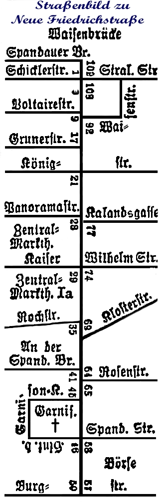 Straßenbild zu Neu Friedrichstraße aus Adressbuch von 1925